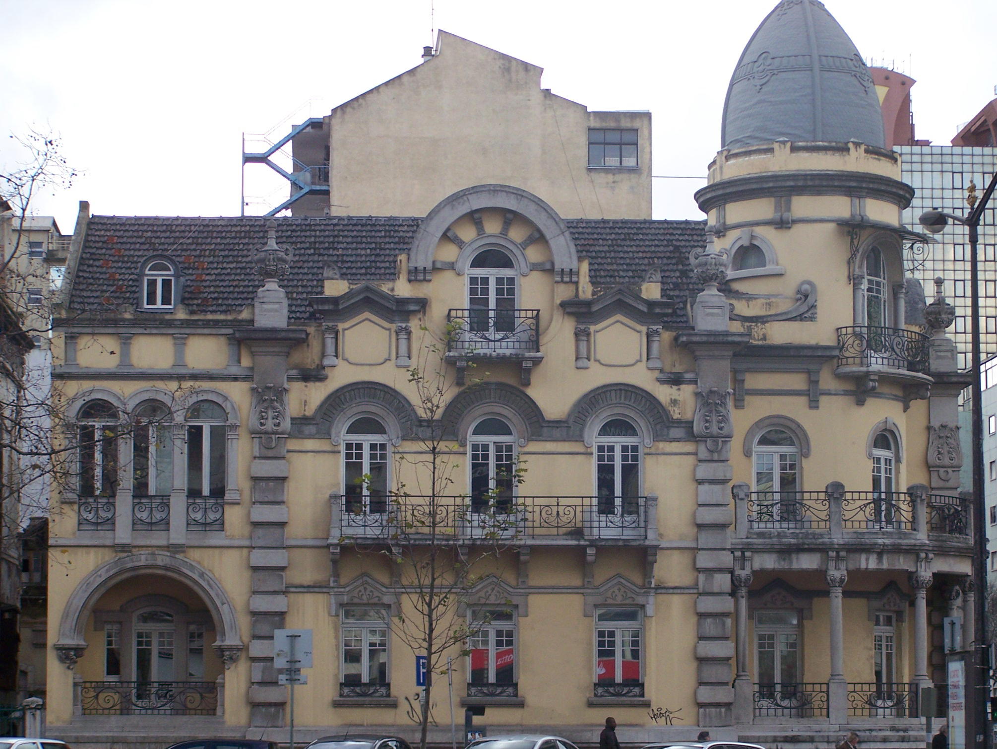 Edifício na Avenida de Berna, nº1/1-A (com a Avenida da República). Classificado como Imóvel de Interesse Público.